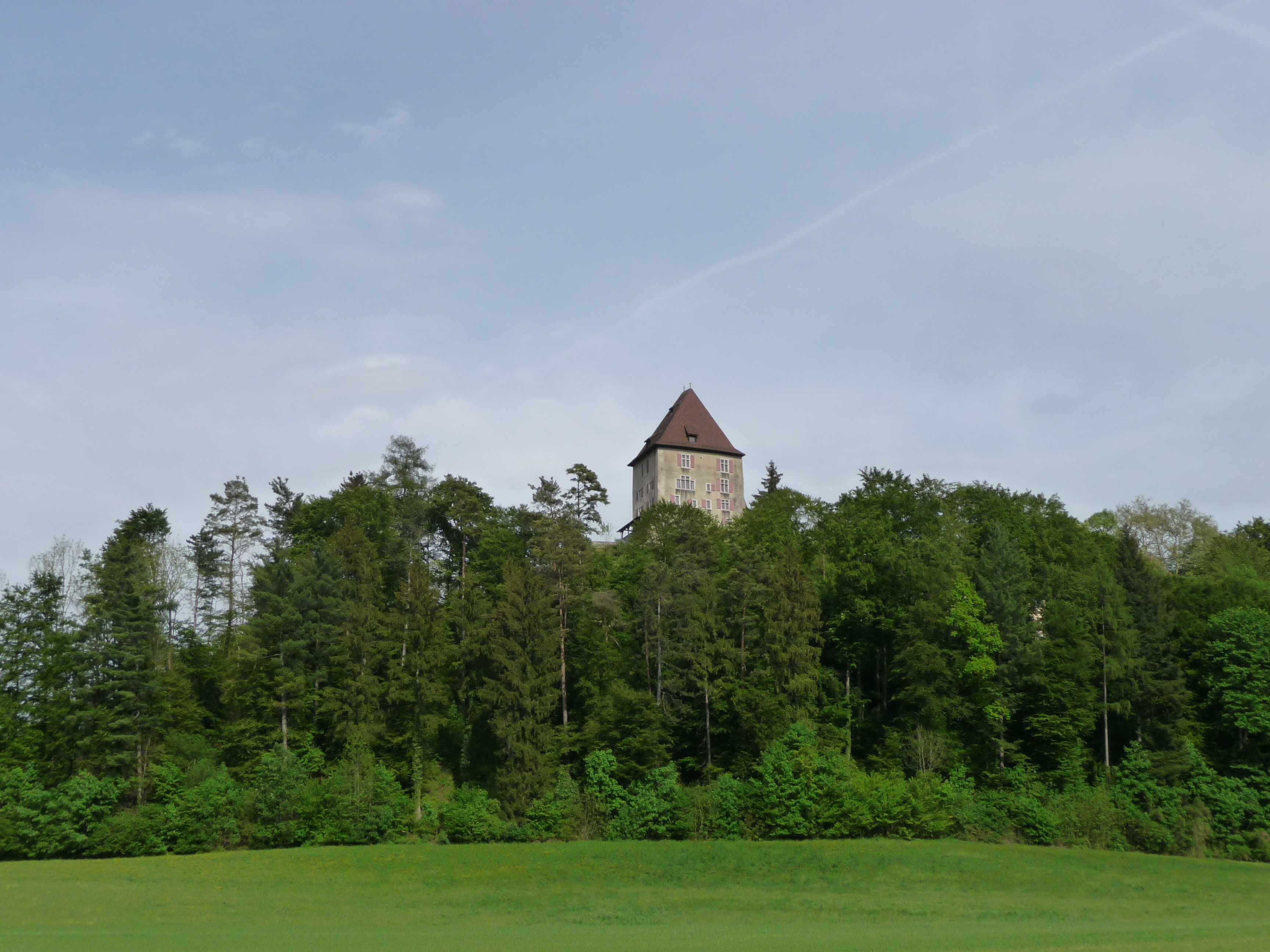 Schloss Liebegg